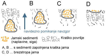 Skica nastanka brezstrope jame.